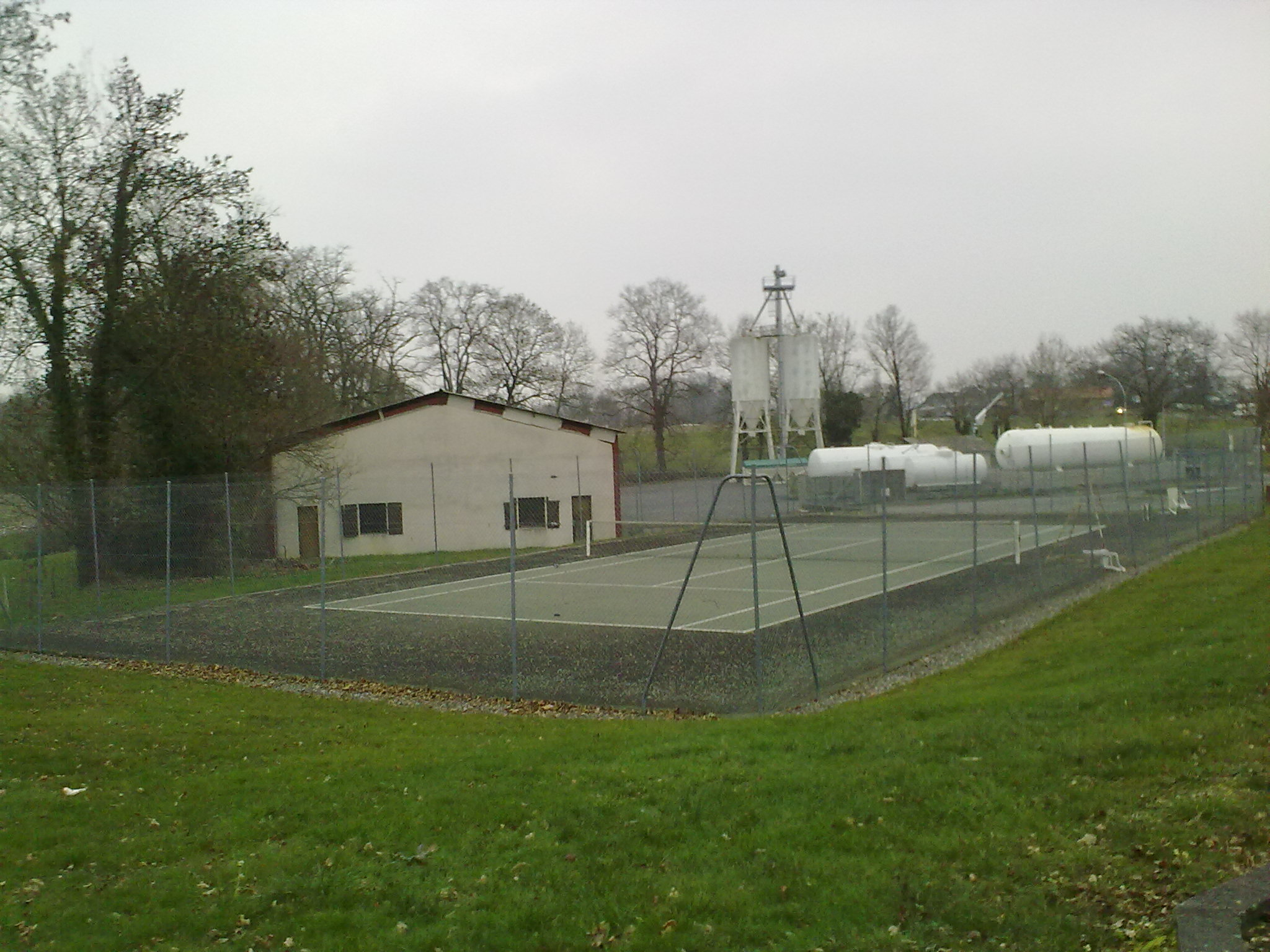 Terrain de tennis de Saint - Jammes , en arrière plan on peut voir le centre artisanal de Saint - Jammes en partie